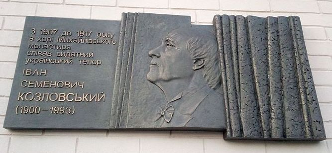 меморіальна дошка Козловського Івана Семена Івановича